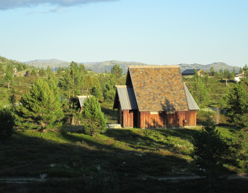 Rossbu kapell (Sel kommune)